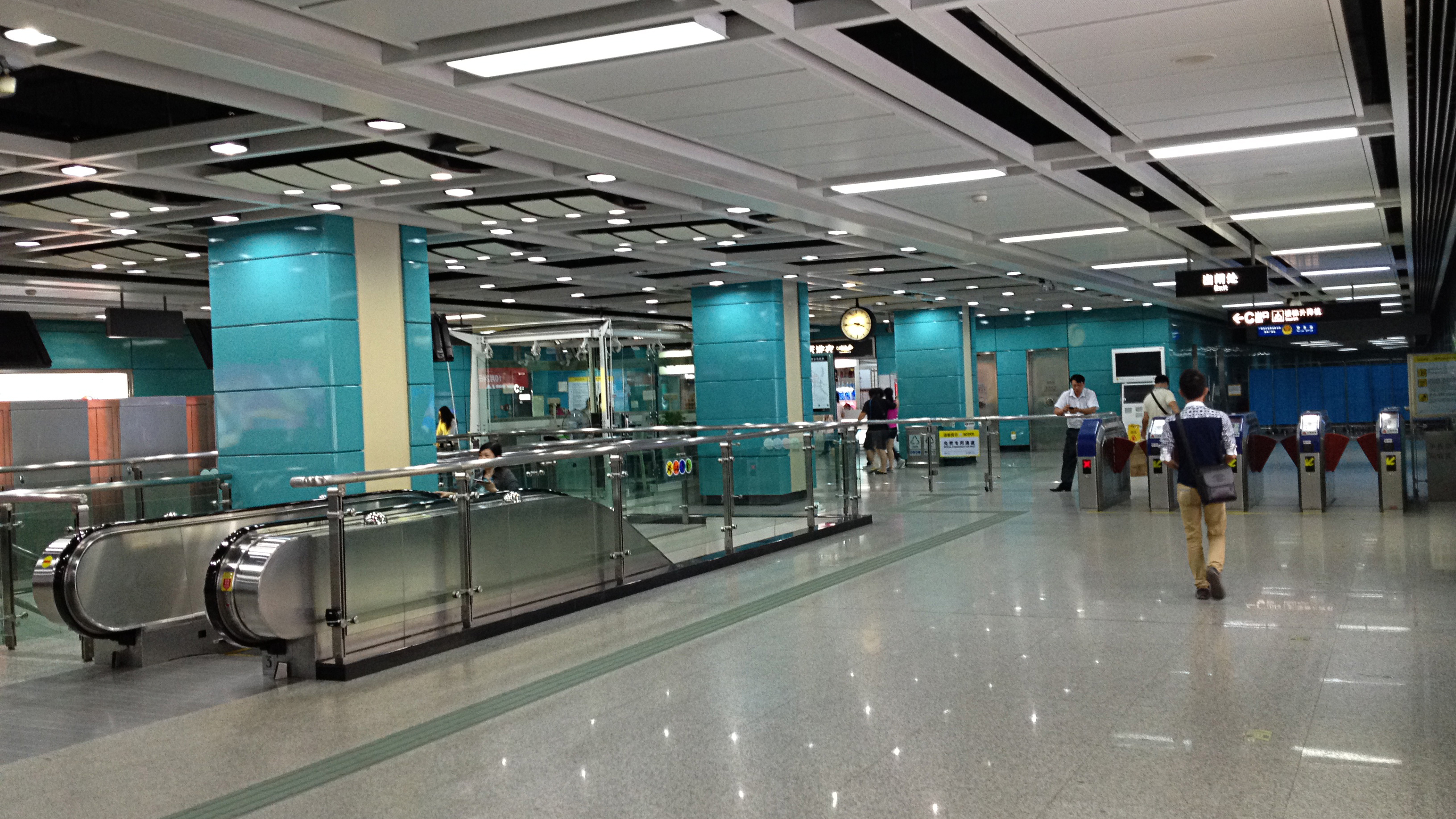 广州地铁番禺广场站站厅